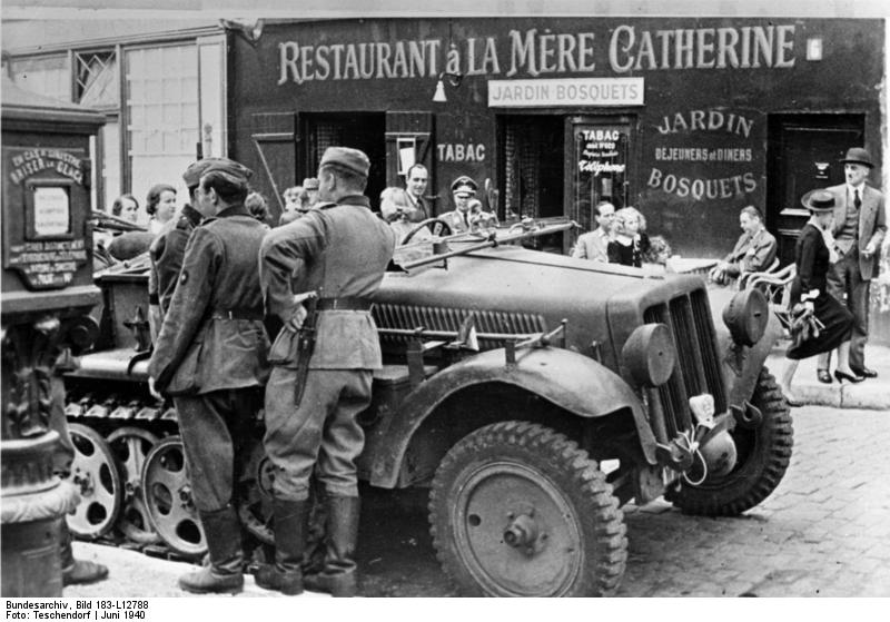 Frankreich, Deutsche Soldaten in Paris Krieg im Westen: Deutsche Soldaten in Paris PK-Teschendorff/Scherl Bilderdienst Juni 1940 8020-40 II.Text-ADN ADN-ZB/Archiv II. Weltkrieg 1939-45 Frankreich während der faschistischen deutschen Okkupation Nach dem deutschen Einmarsch am 14. Juni 1940 in Paris bestimmen deutsche Soldaten das Straßenbild; Angehörige einer schweren Artilleriereinheit während eines kurzen Halts beim Marsch durch die französische Hauptstadt, Ende Juni 1940 (Aufnahme: Tschendorff) 8020-40